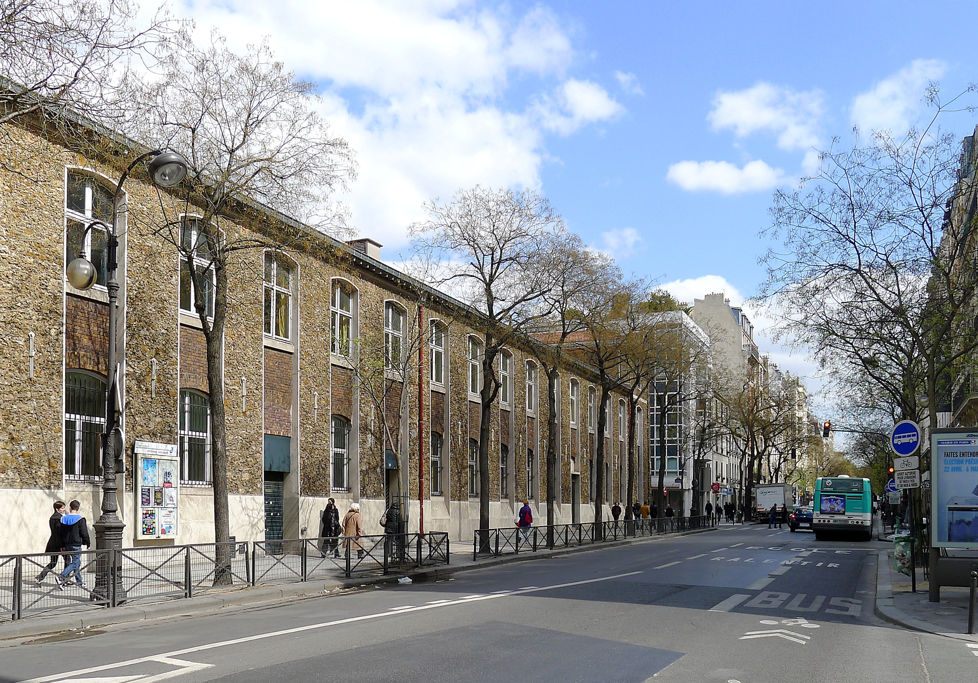 groupe scolaire par Joseph Auguste Émile Vaudremer, 132 rue d'Alésia - Paris XIV